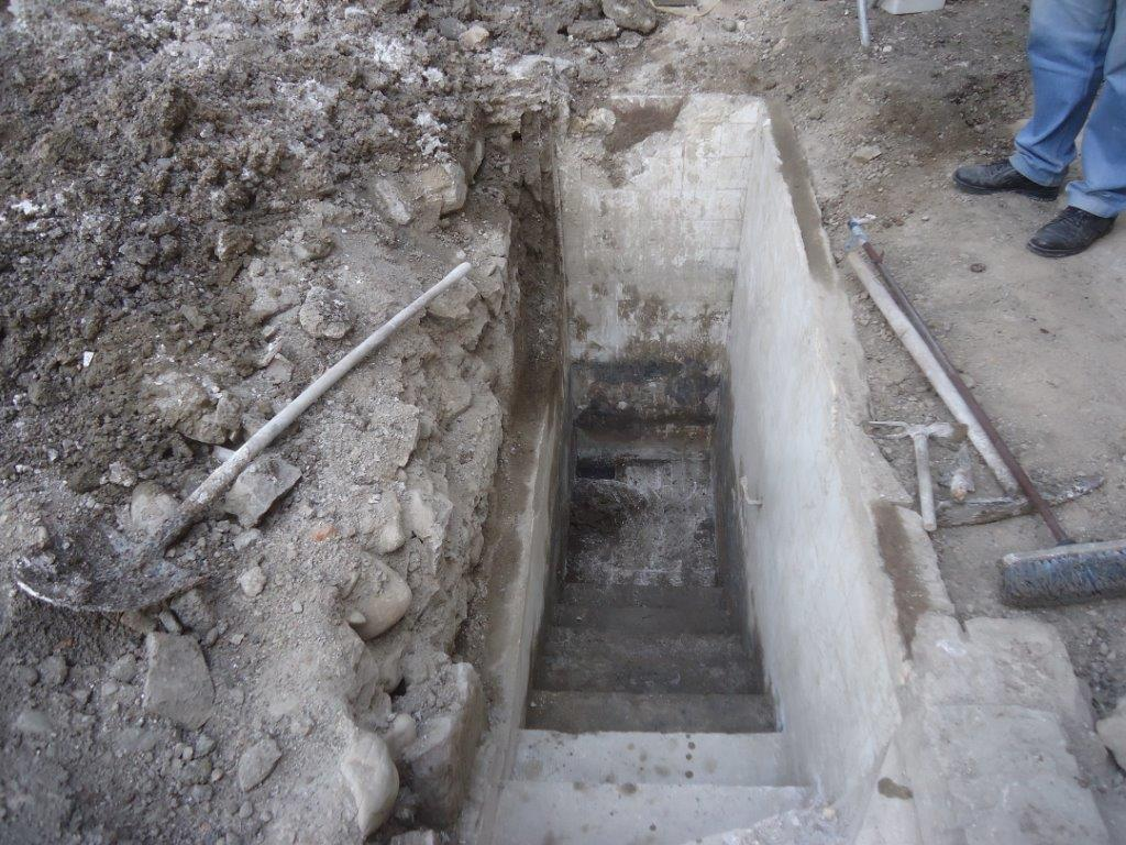 Fouilles archéologiques de l’Inrap dans la cour de la synagogue de Thann et découverte du bain rituel le 17 mars 2014.